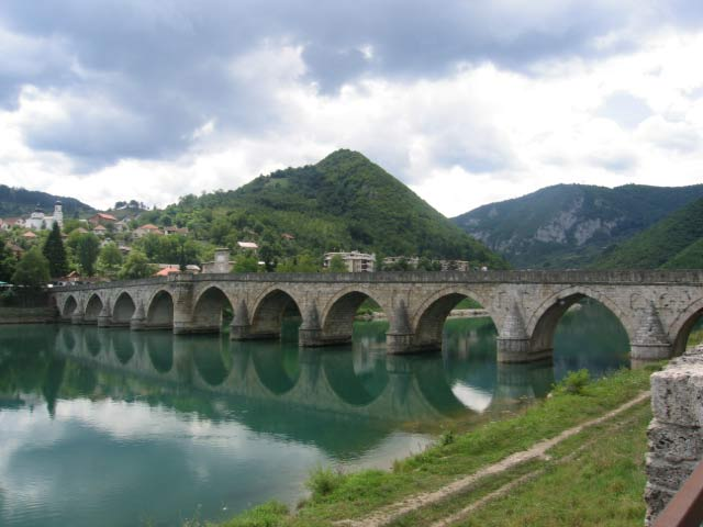 Višegrad bridge